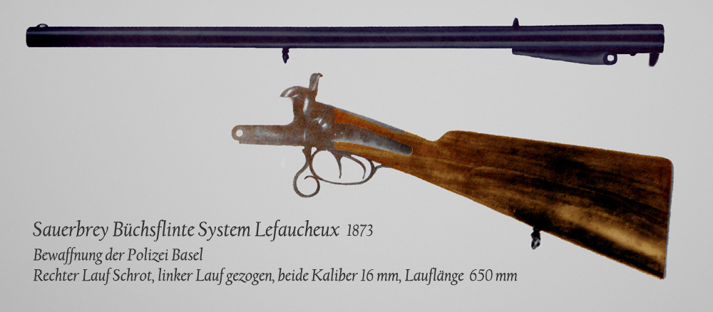 Sauerbrey73 Büchsflinte